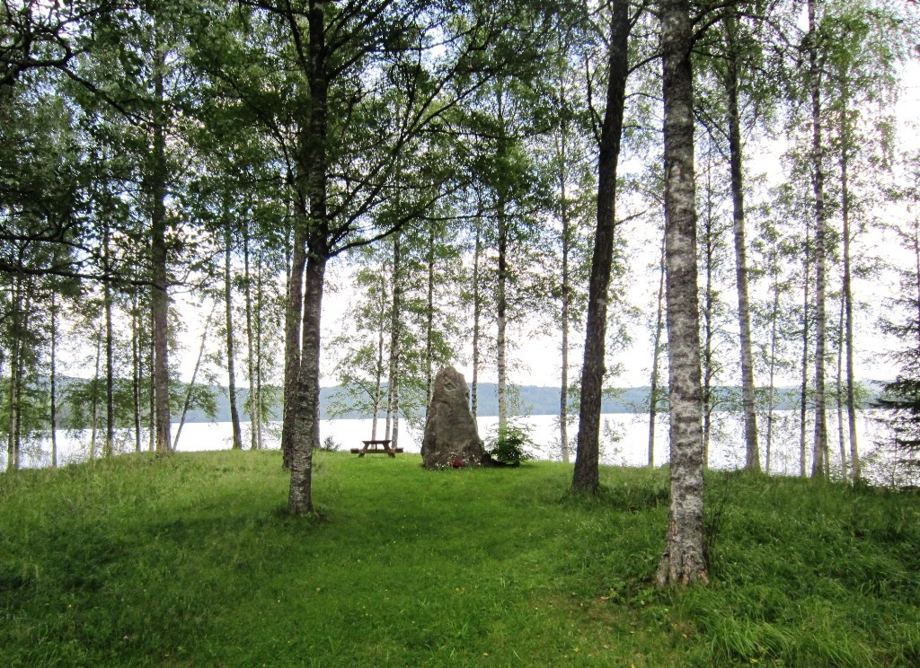 Rakeie gravplass i skogen øst for Årnes, Nes kommune i Akershus